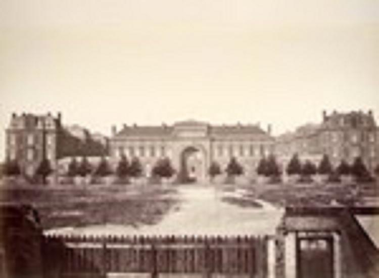 Lille — Hôpital Sainte Eugénie construit entre 1866 et 1873. Renommé Hôpital de la Charité en 1880. Les bâtiments sont réaffectés en 1992 pour créer le Lycée Européen Montebello. (Architecte : Wladimir Mitrofanoff). Lire l'article "L'hôpital de la Charité à Lille : le thème du château" d'Agnès Durande sur la page du site Réf : et * Les métadonnées en bas de cette page donnent des informations intéressantes sur ce cliché.